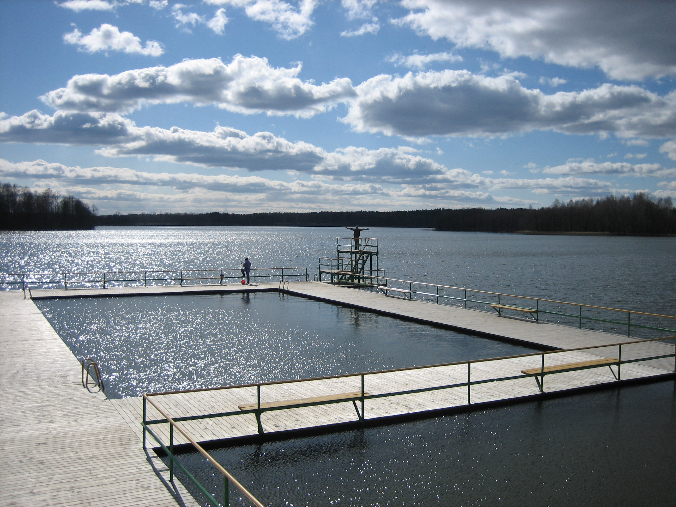 Ežeras Gavys prie Ignalinos